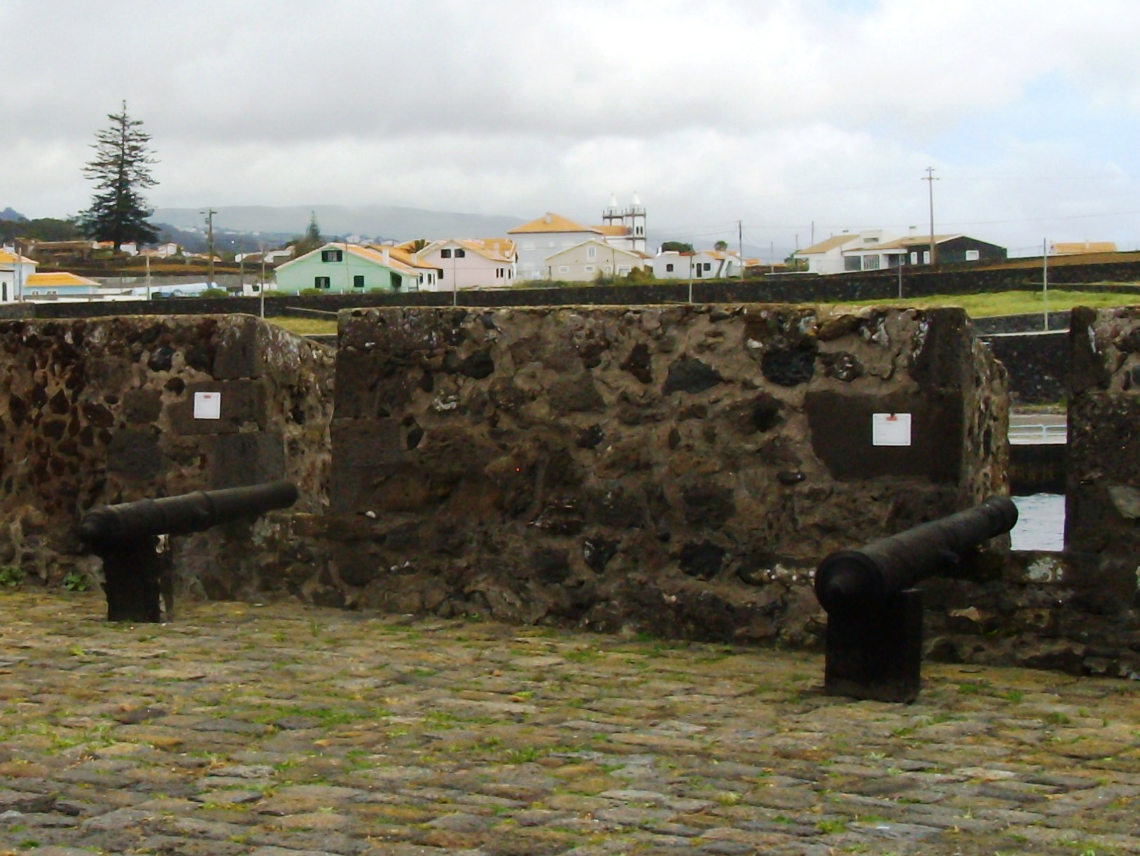 Forte do Negrito, São Mateus da Calheta, Angra do Heroísmo, ilha Terceira, Açores: aspecto do terrapleno.